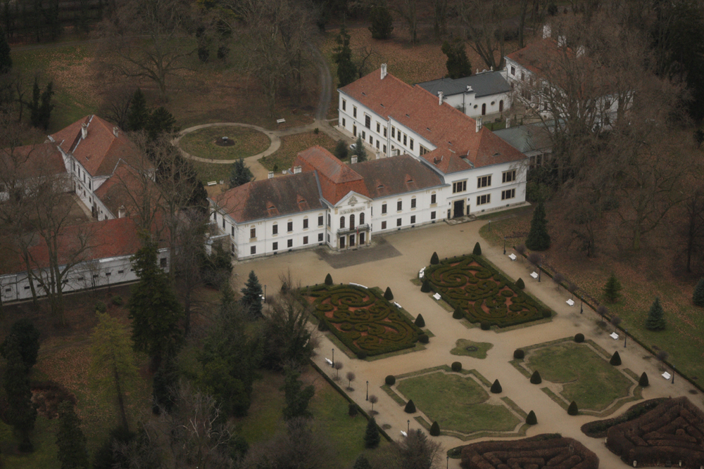 A nagycenki Széchenyi-kastély és parkja, Győr-Moson-Sopron megye